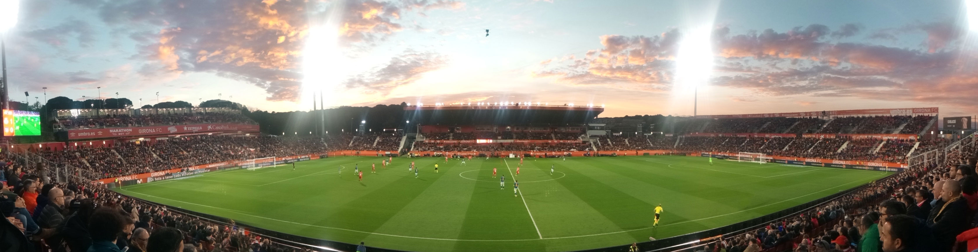 Estadio montilivi 02-12-2018 Girona vs Atletico de Madrid